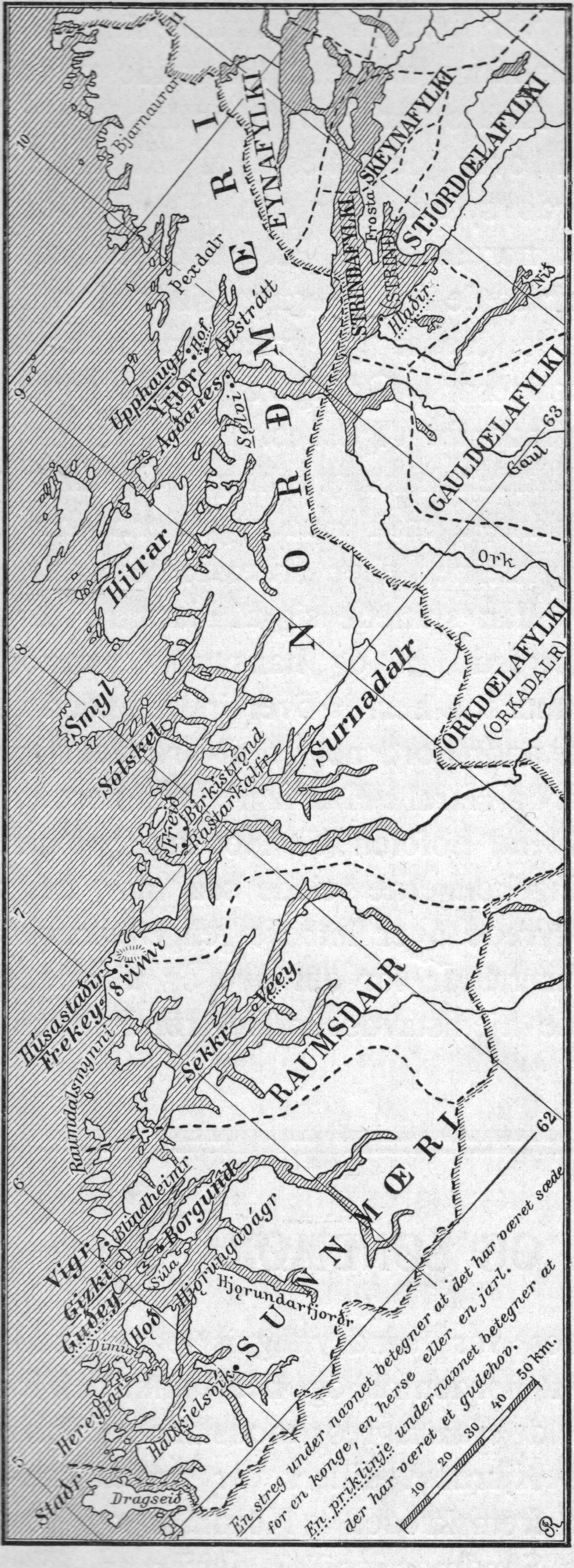 Kart over Nordmøre, Romsdalen og Sunnmøre i middelalderen.